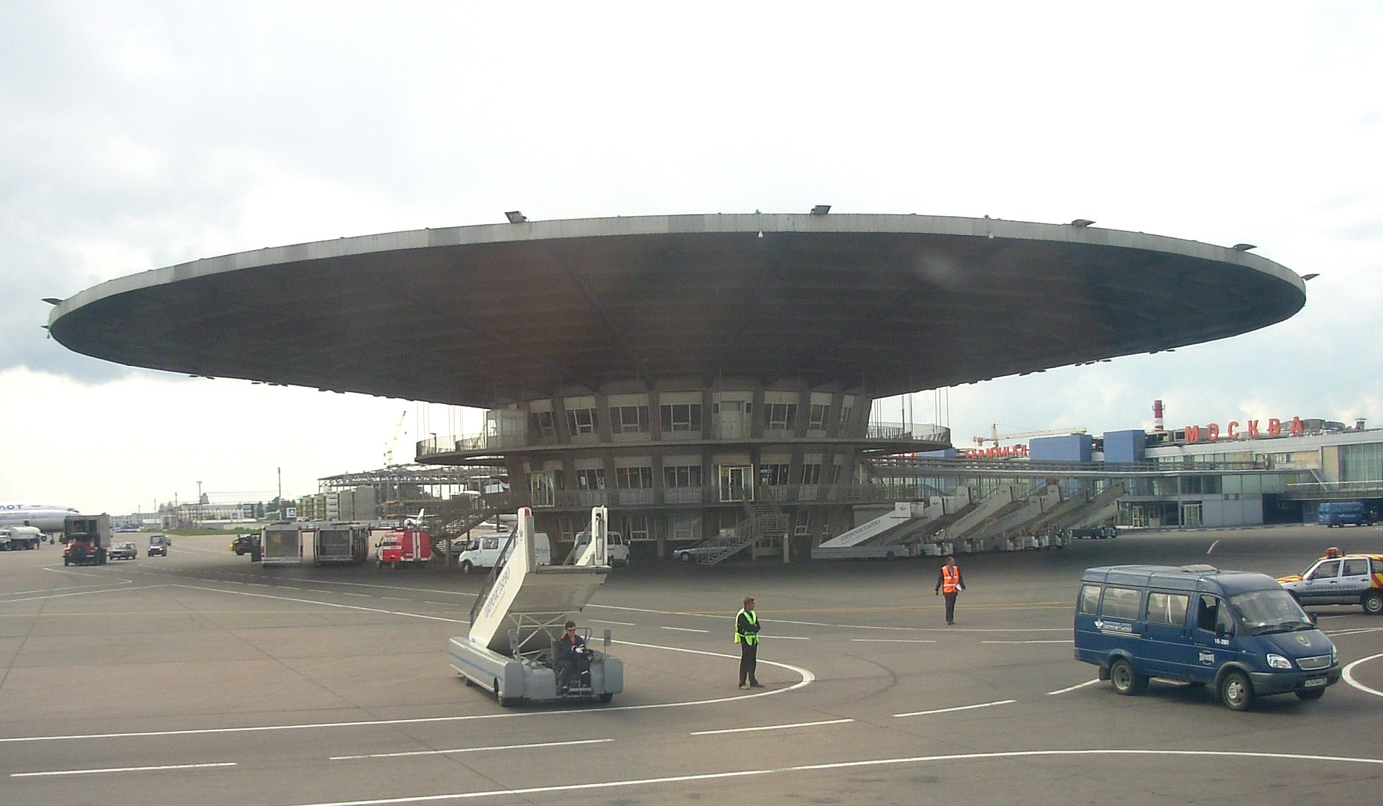 Terminal 1 lotniska Szeremietiewo w Moskwie. Lato 2006.